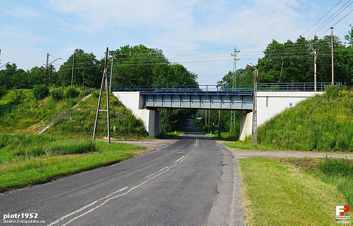 Wiadukt